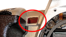 Lorsqu'il fait sombre, le sujet à photographier est peu contrasté, la mise au point automatique est alors impossible. Ce faisceau va permettre d'augmenter le contraste et ainsi d'assurer le fonctionnement de l'autofocus.